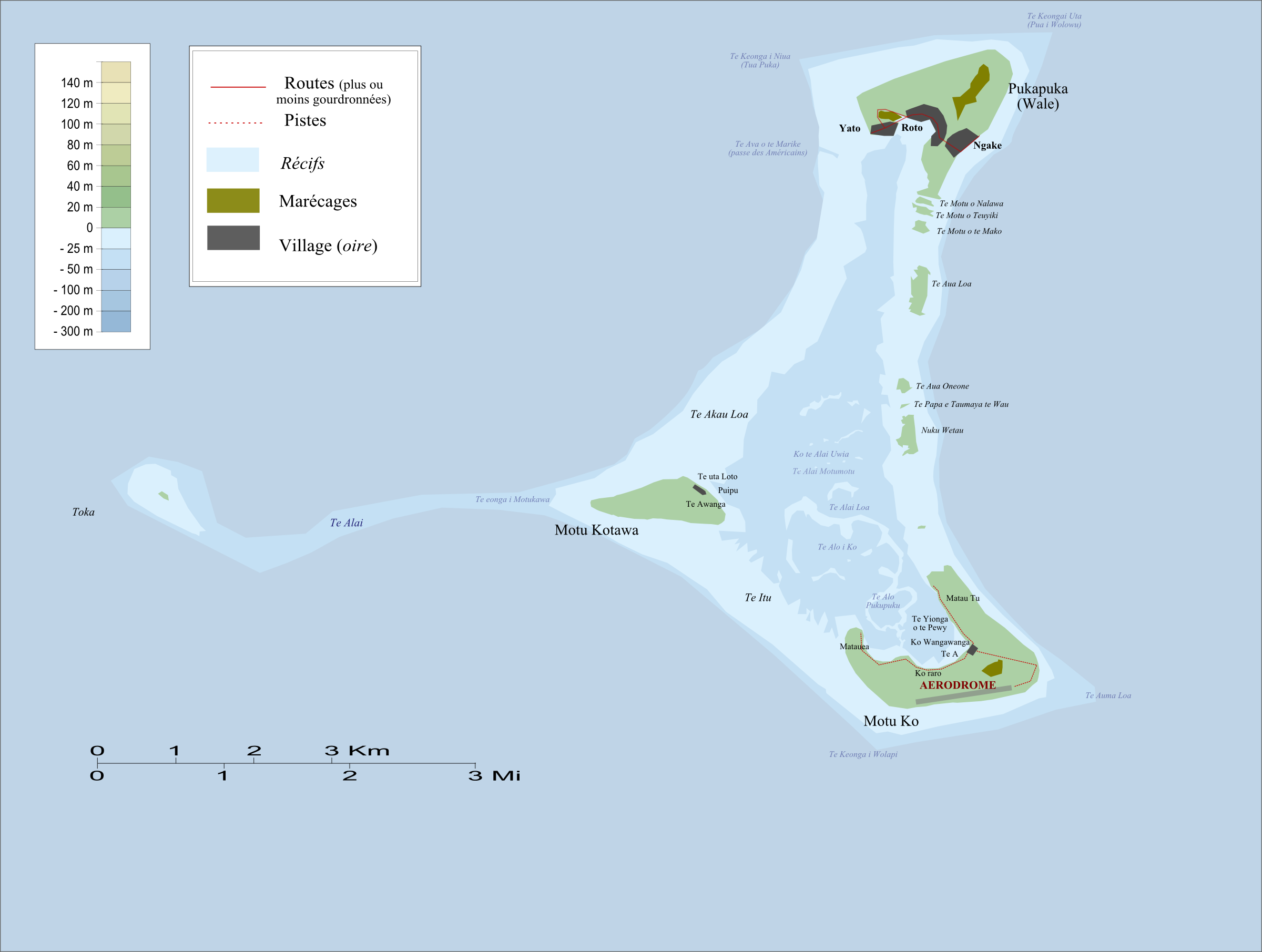 Carte de Pukapuka (îles Cook)/map of Pukapuka (Cook Islands)